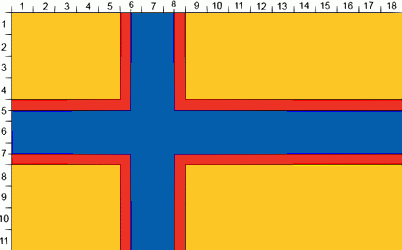 Пропорции ингерманландского флага